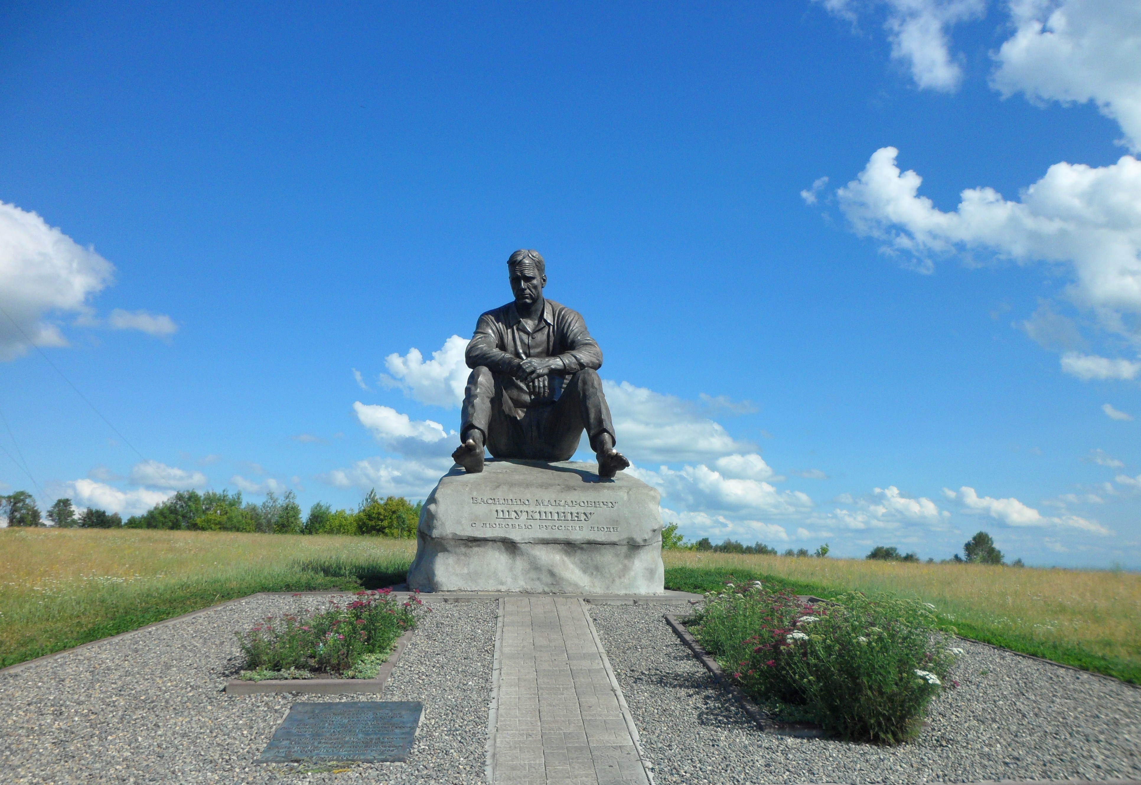 Гора Пикет - памятное место, связанное с жизнью и творчеством актера, кинорежиссера и писателя В.М. Шукшина: Сростки, Бийский район, Алтайский край